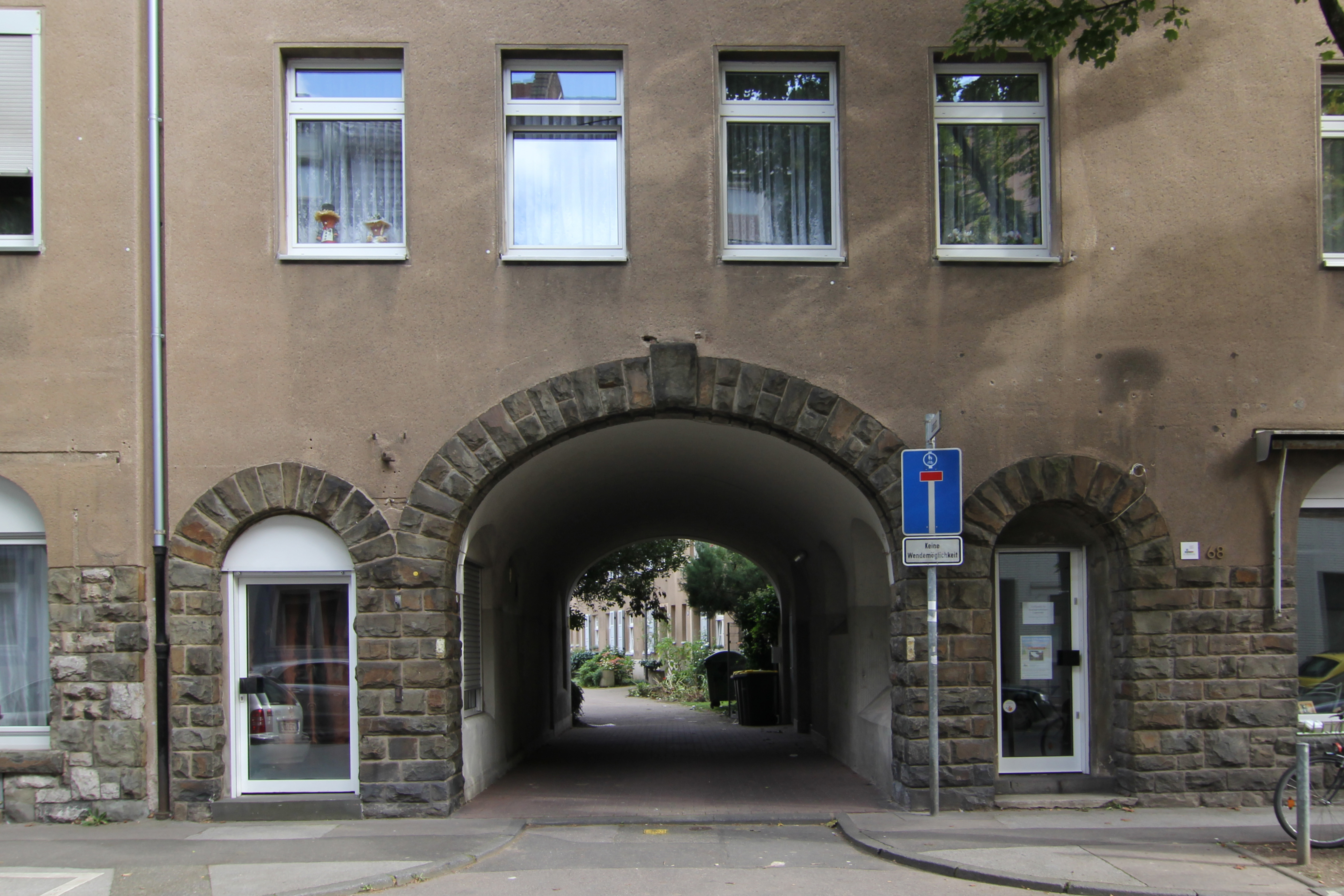 Siedlung der Ehrenfelder Arbeiterwohnungsgenossenschaft, Takustr. 64–76This is a photograph of an architectural monument.